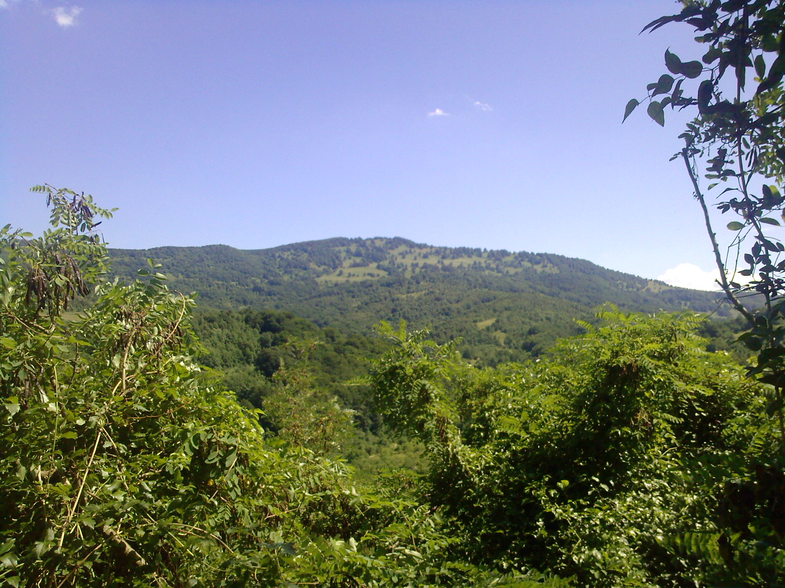 Vârful Măgura Priei, Munţii Meseş